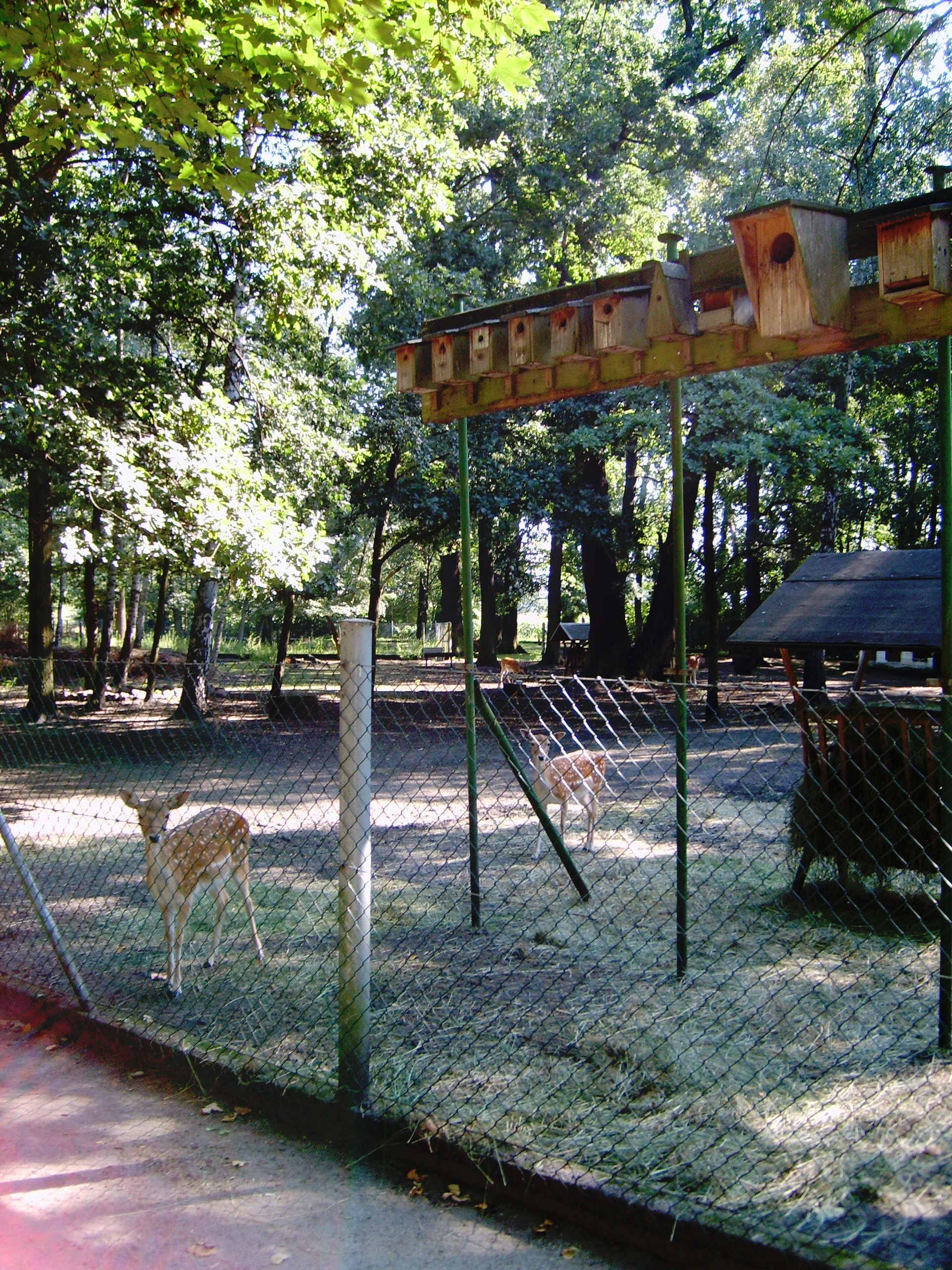 Tiergehege im Schlosspark Lauchhammer-west